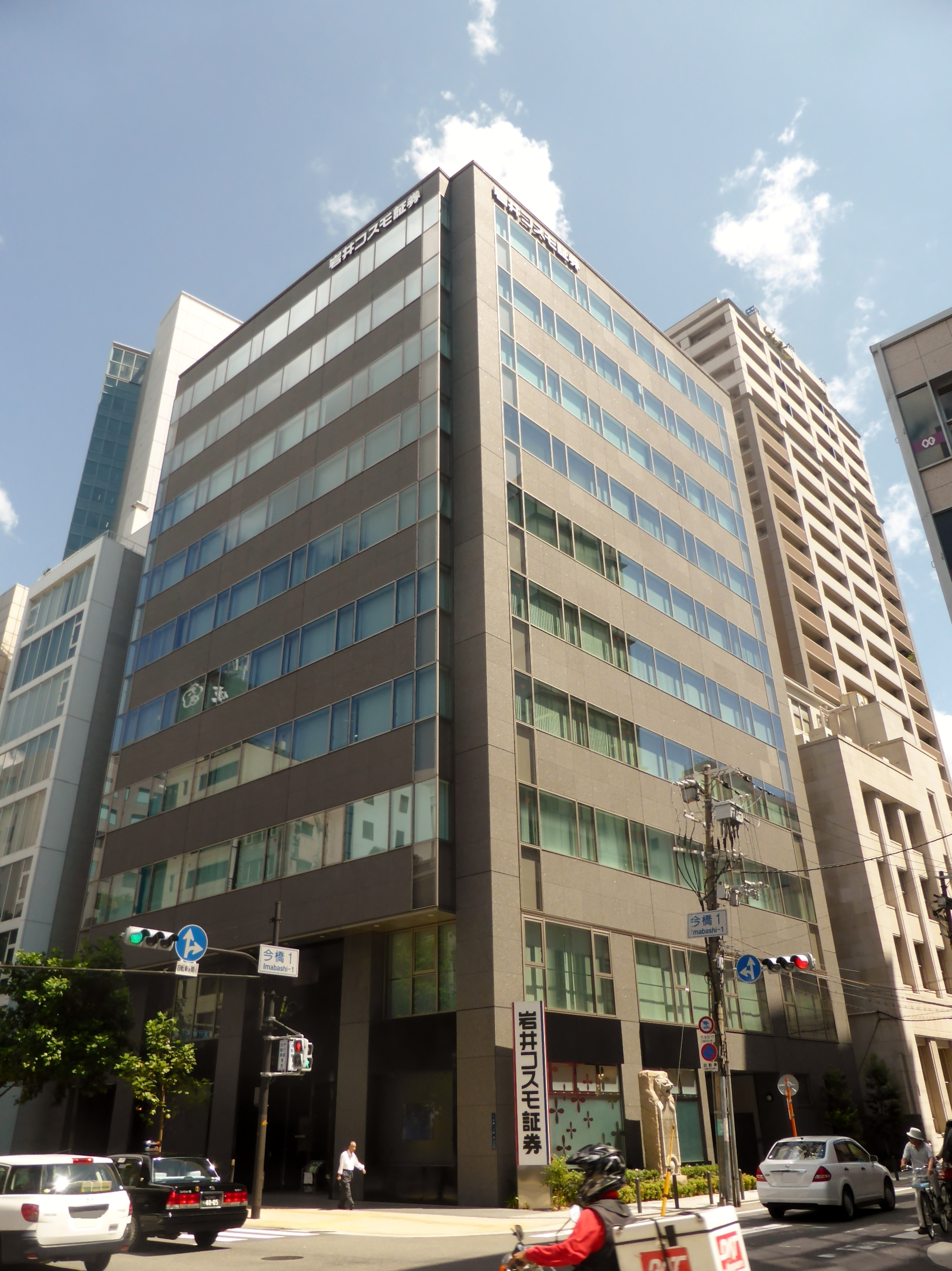 岩井コスモ証券本社を撮影